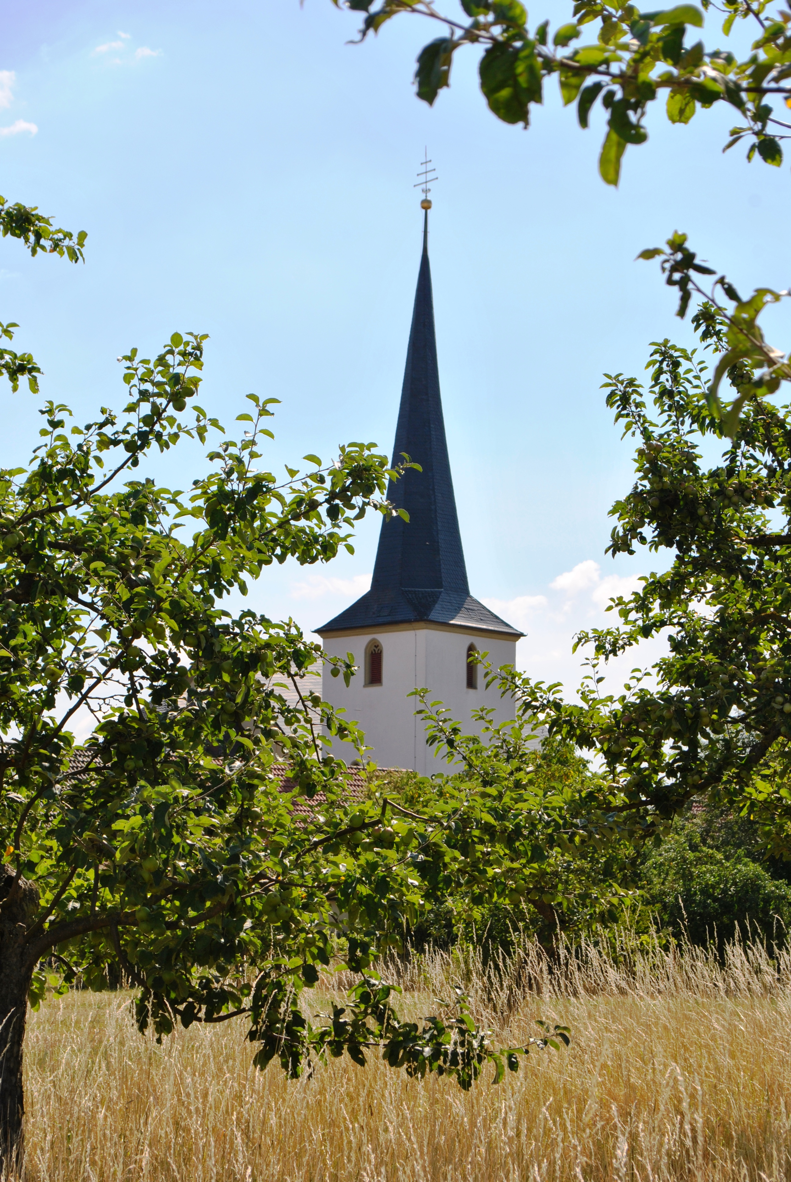 Kirche St. Jakob in Prichsenstadt-Kirchschönbach